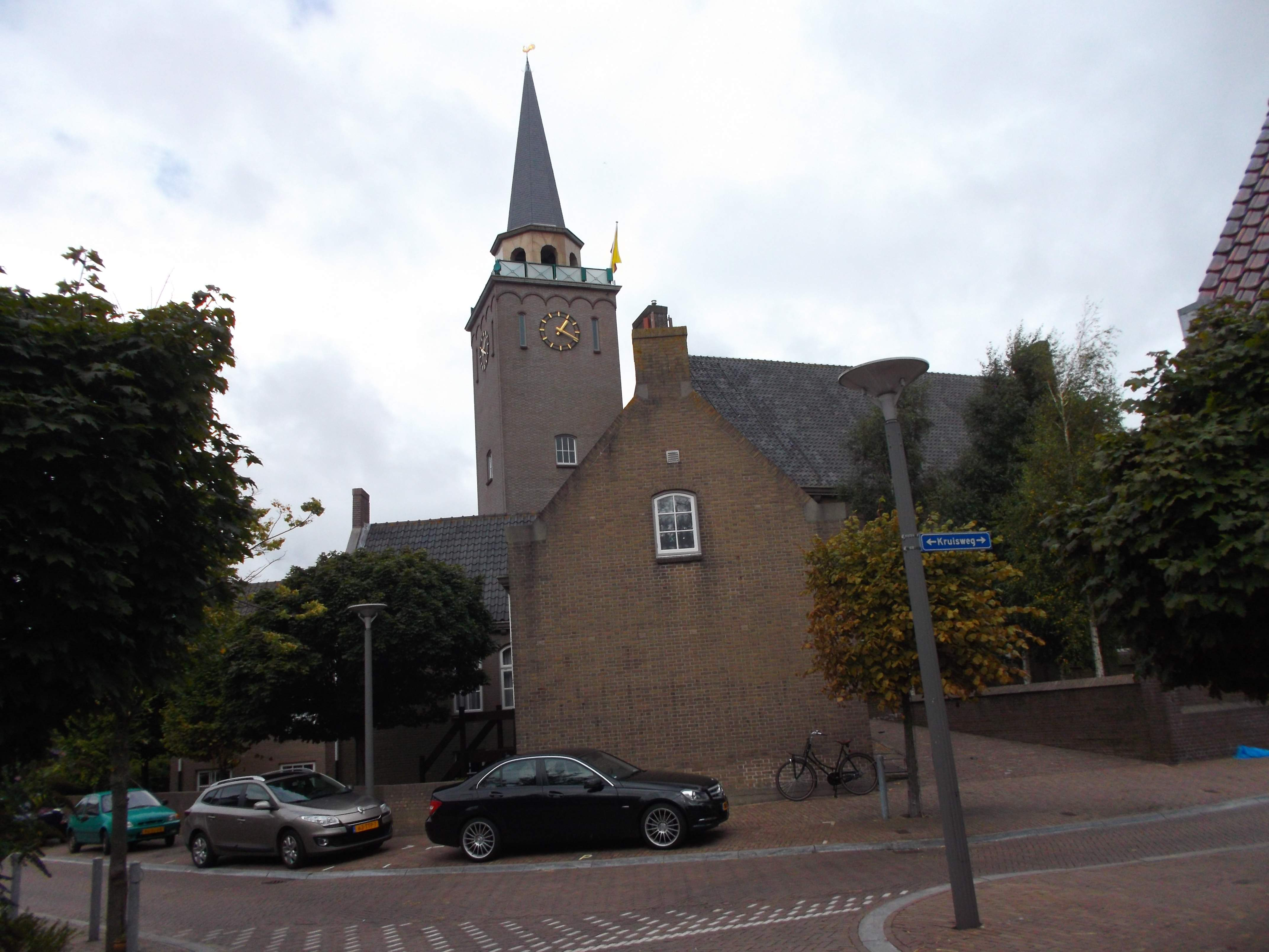 Kerk Valkenburg, Castellumplein + Torenmuseum (in de toren).